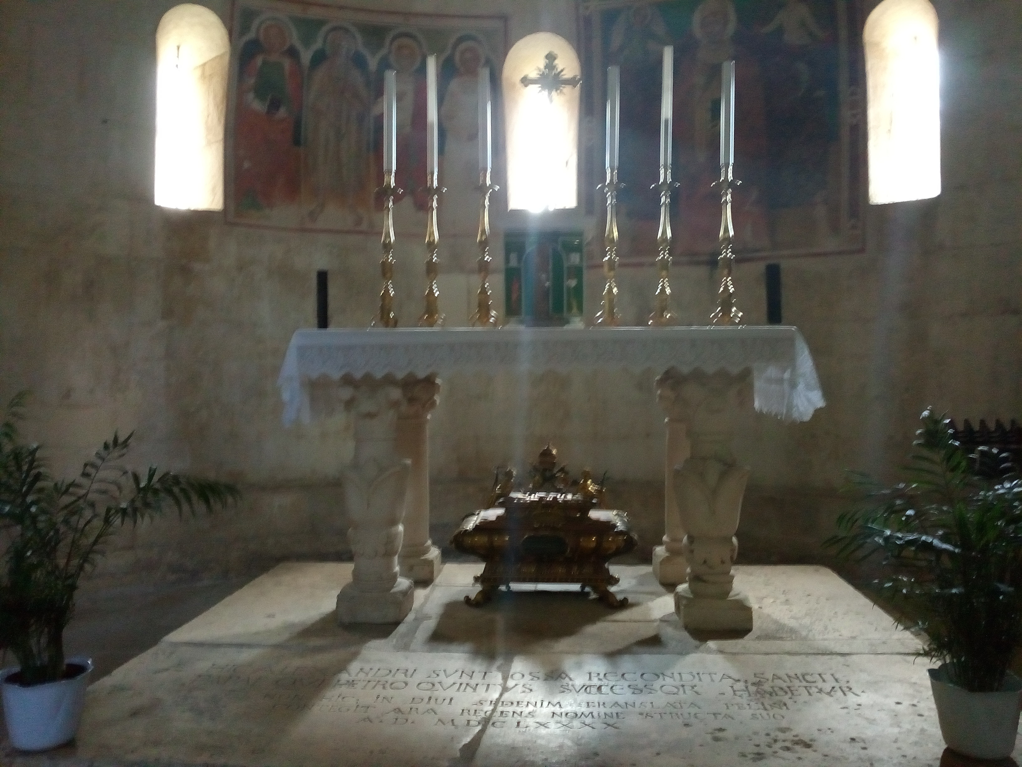 La tomba di San Pelino